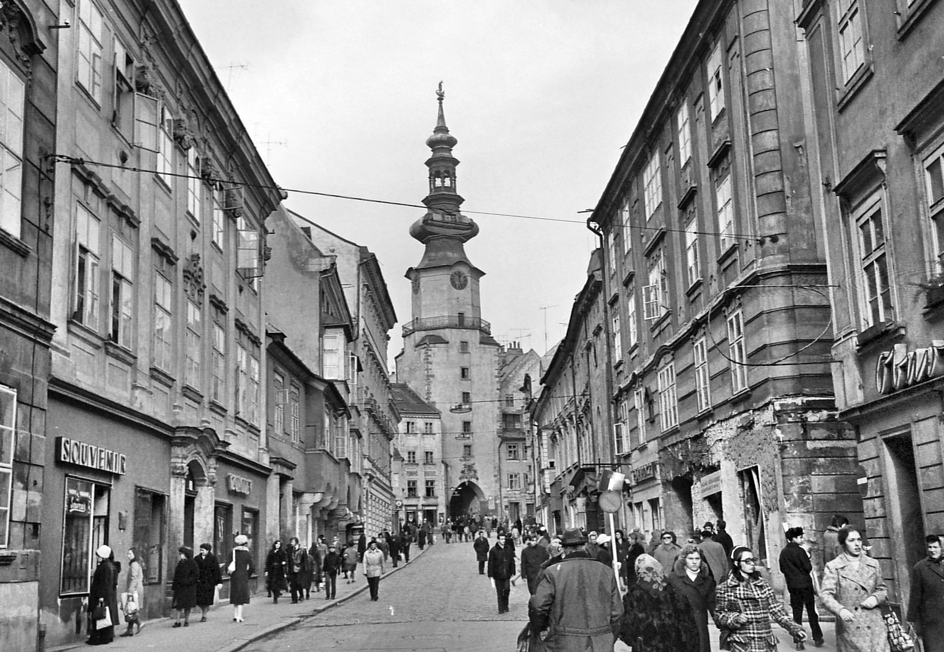 Mihály-kapu. Location: Slovakia, Bratislava Tags: Czechoslovakia, gate tower, souvenir, shoe store, pedestrian Title: Mihály-kapu.